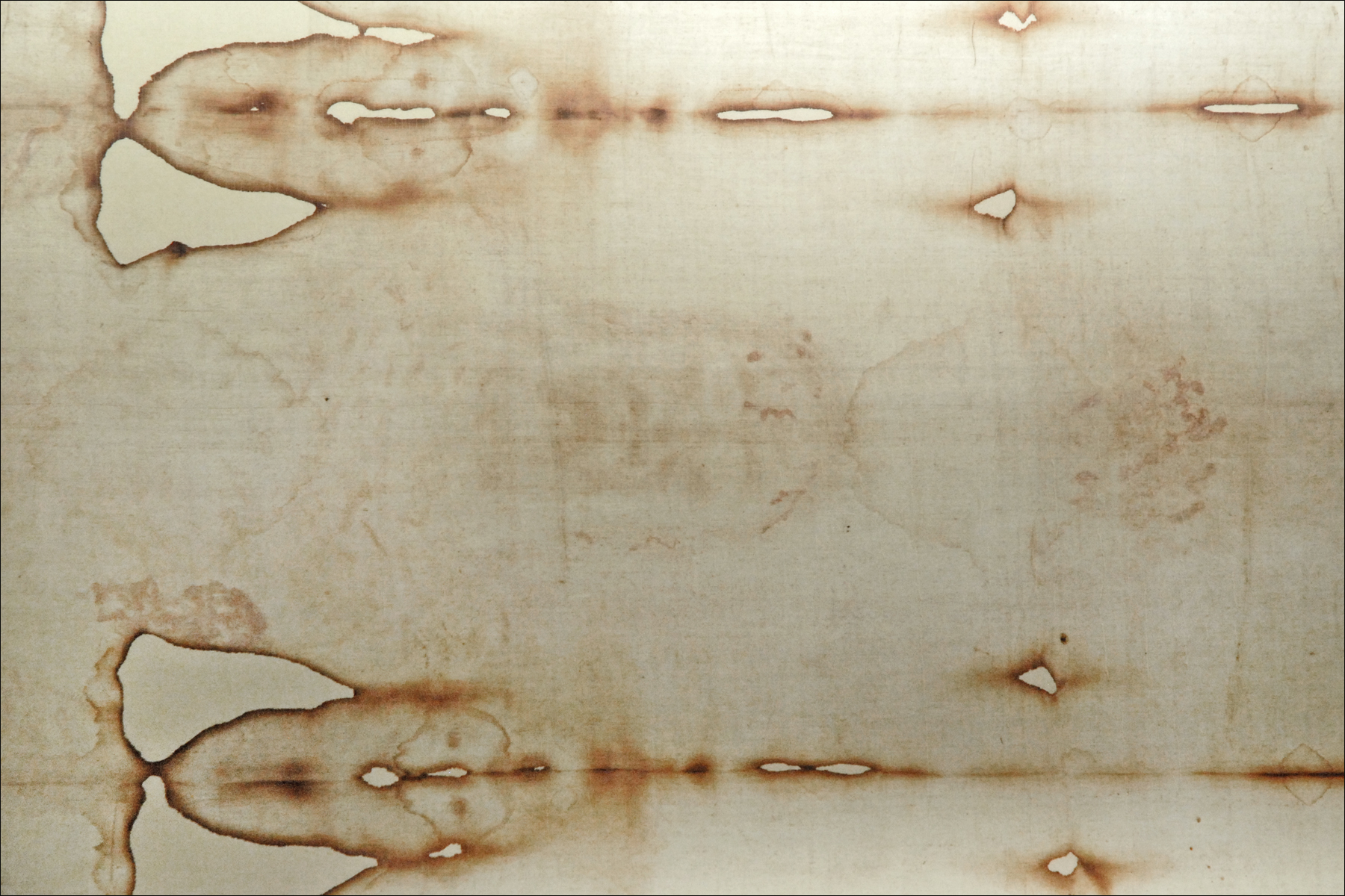 Reliques de la Passion dans la chapelle Sainte-Hélène : copie du Saint-Suaire Cette copie du Saint-Suaire a été donnée à la Basilique en 2002 par l'Archidiocèse de Turin Basilique Sainte-Croix-de-Jérusalem, Santa Croce in Gerusalemme ____________________ La basilique a été construite sur le lieu où se trouvait le palais Sessorien, résidence de la mère de Constantin, l'impératrice Hélène. Elle partit à Jérusalem et en ramena en 329 un fragment de la vraie Croix. Cette relique a d'abord été conservée dans une chapelle construite au sein du palais : la chapelle Sainte-Hélène. Une église plus vaste a ensuite été bâtie mais elle n'a eu son aspect actuel qu'au XVIIIème siècle. L'architecte Domenico Gregorini (1692-1777) a conçu cette façade convexe et son vestibule ovale dans le style de Borromini. La Chapelle de la Croix et des Reliques de la Passion, a été souterraine jusqu'en 1930 date à laquelle une nouvelle chapelle a été édifiée. On accède aujourd'hui par le fond de l'église à cet important lieu de pèlerinage chrétien. La chapelle des Reliques contient des morceaux de la Croix du "bon larron", crucifié aux cotés de Jésus, des fragments de la vraie Croix, une partie de l'inscription de la Croix ; INRI (Jésus de Nazareth roi des Juifs), deux épines de la couronne du Christ, le doigt de Saint-Thomas, un clou de la Passion, etc. Article de Wikipedia